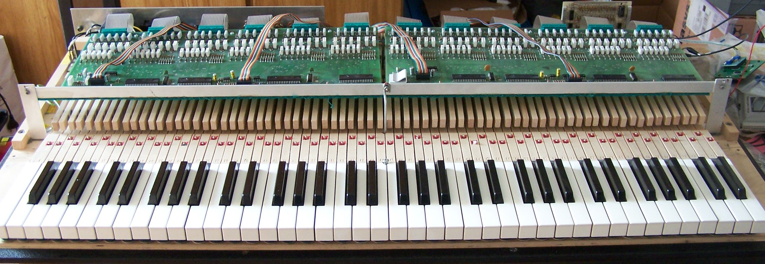 Lo strumento senza il mobile